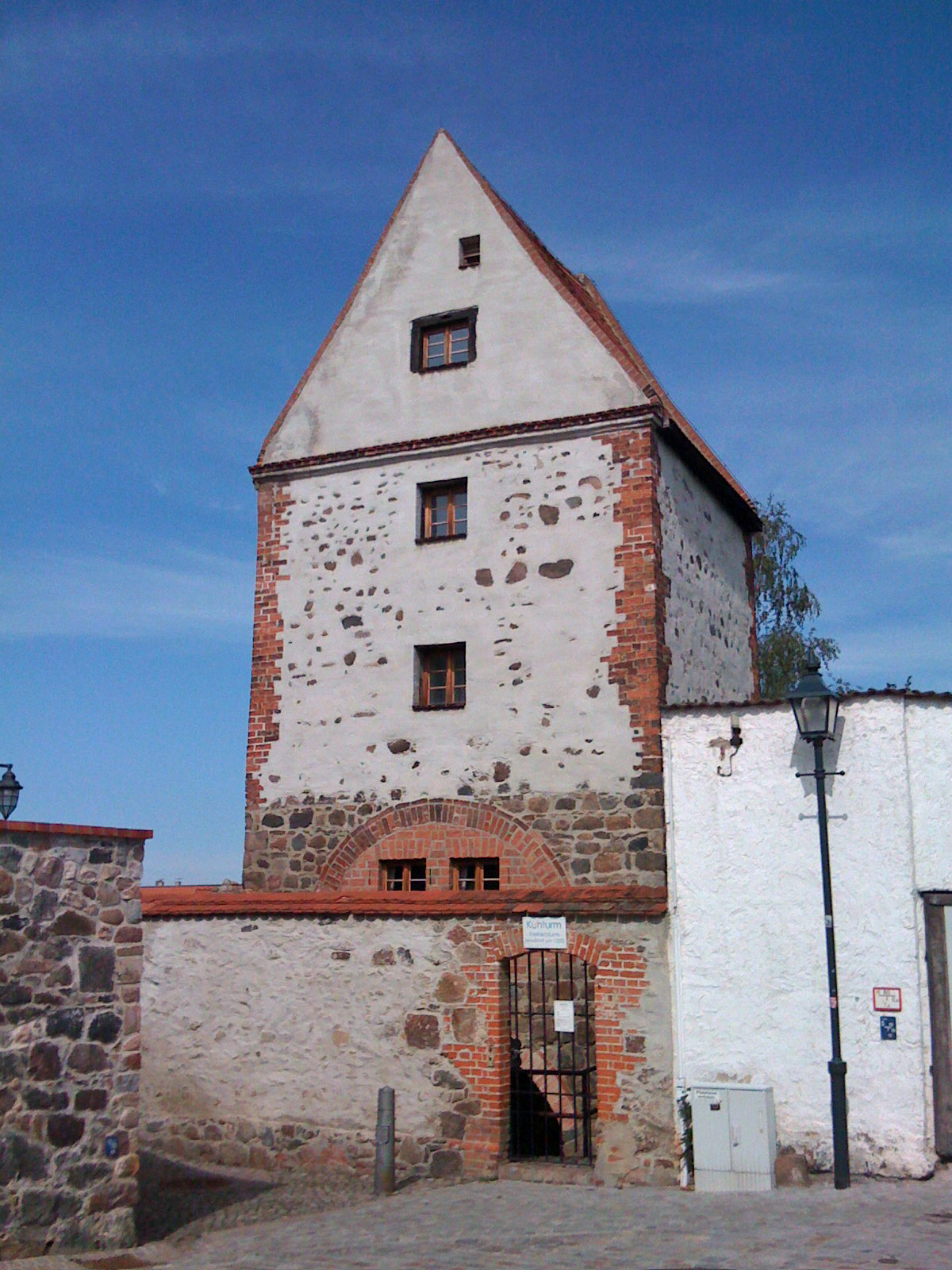 Der Freiheitsturm in Burg bei Magdeburg, auch Kuhturm genannt.